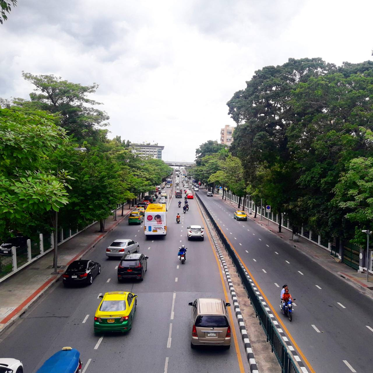 ถนนราชวิถี บริเวณด้านหน้าพระราชวังพญาไท เขตราชเทวี